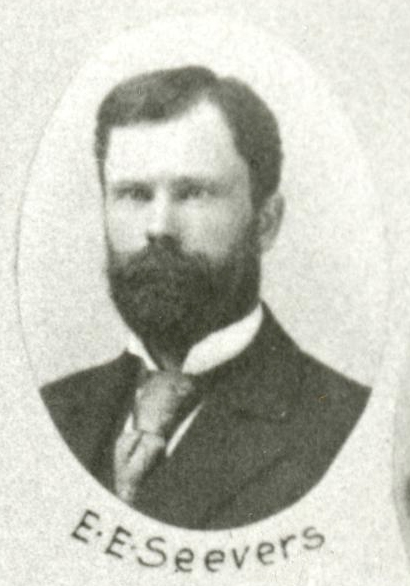 Rep EE Seevers